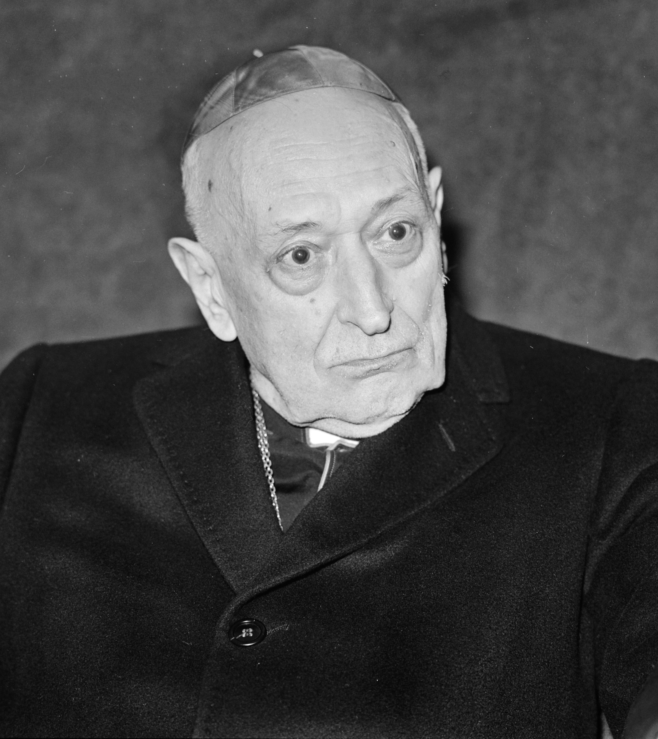 Kardinaal Mindszenty even op Schiphol, kardinaal Mindszenty op Schiphol, kop